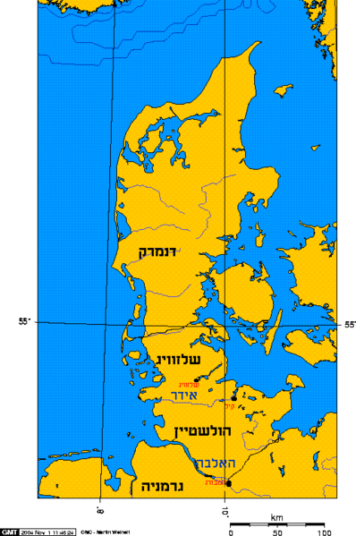 מפה של מחוז שלזוויג ומחוז הולשטיין מפה מקורית נלקחה מ:[1], שונתה על ידי .